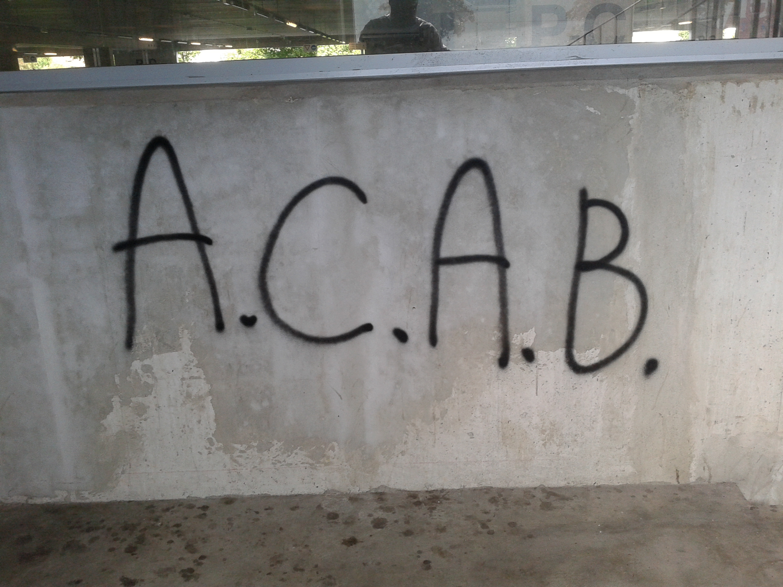 Grafit v garaži CityPark, BTC Ljubljana